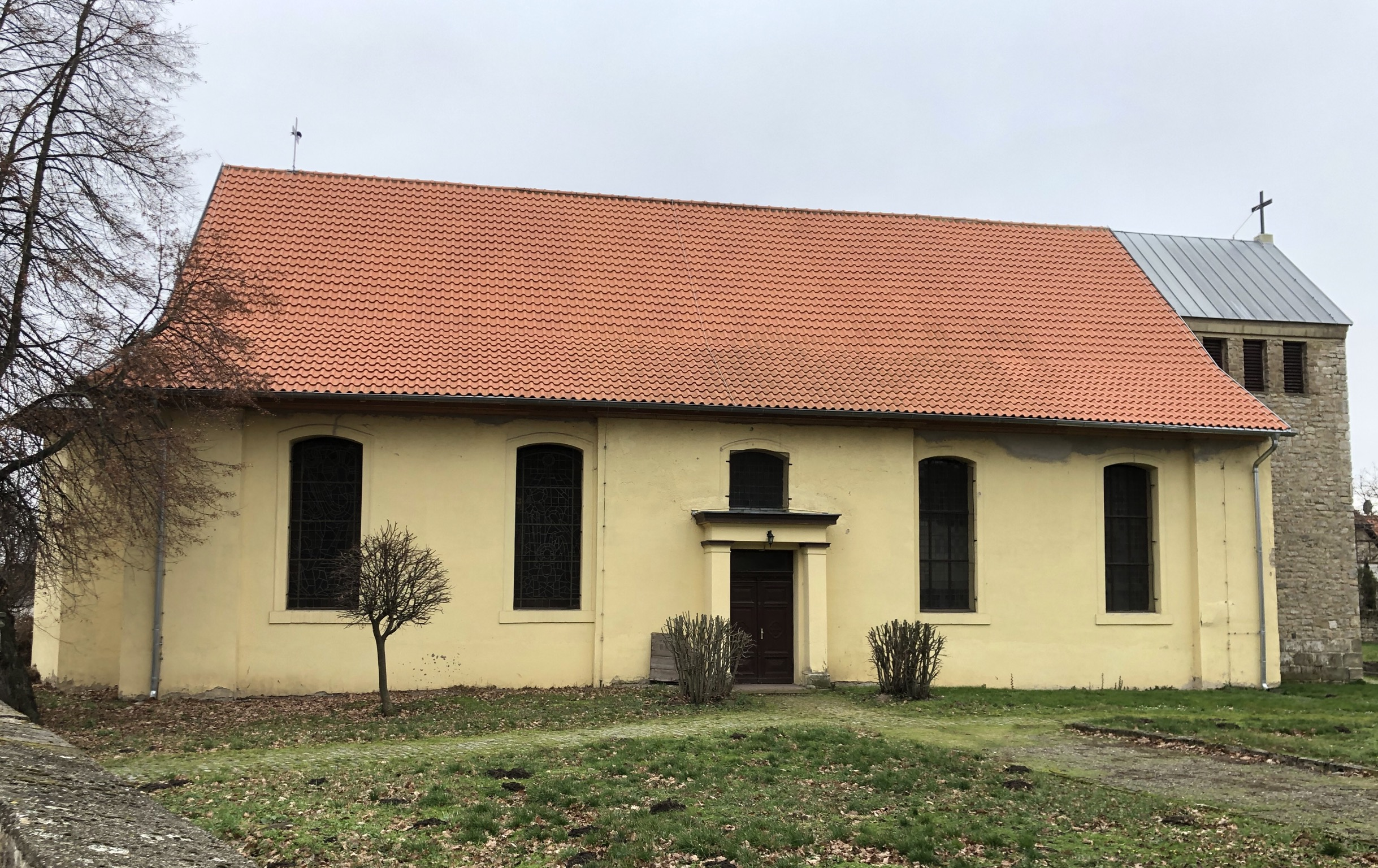 Kirche in Hedersleben evangelisch